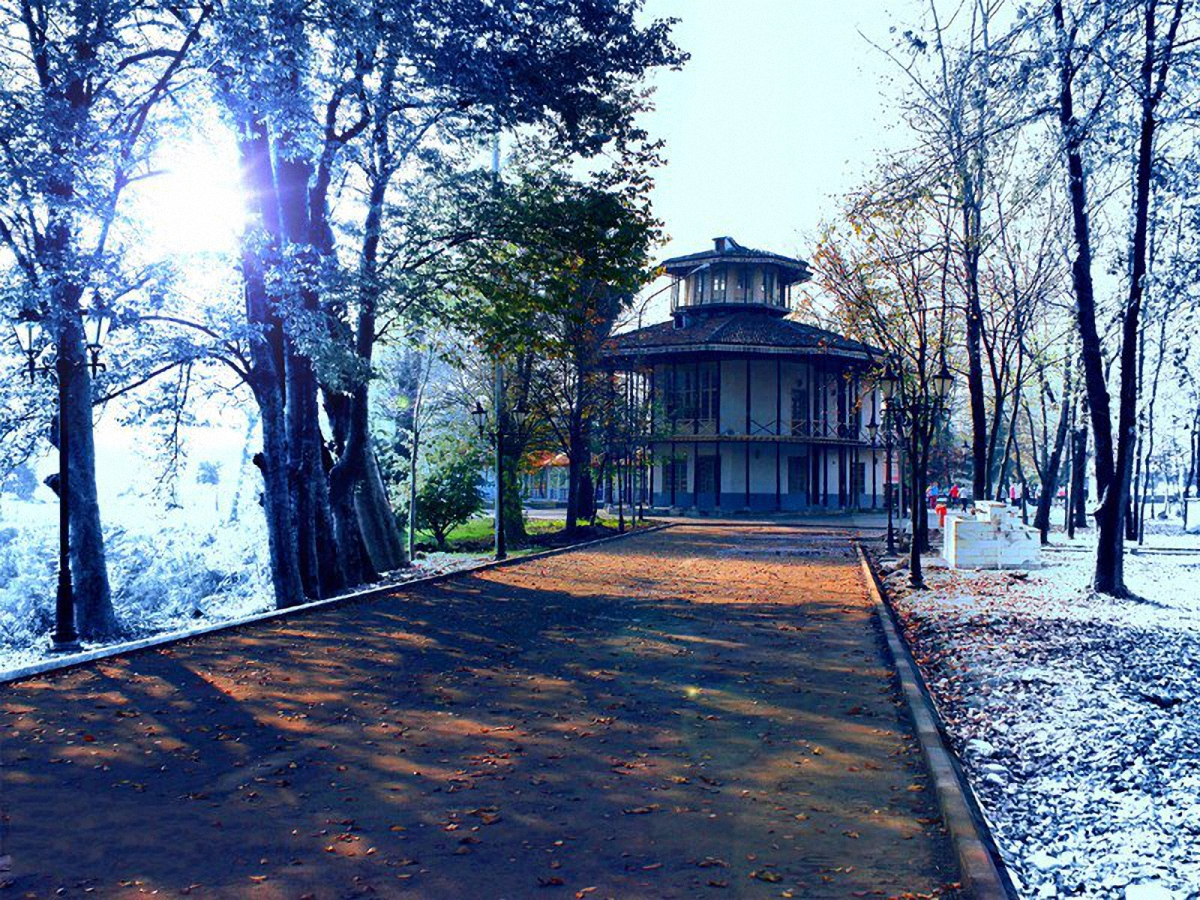 عمارت کلا فرنگی در باغ محتشم رشت